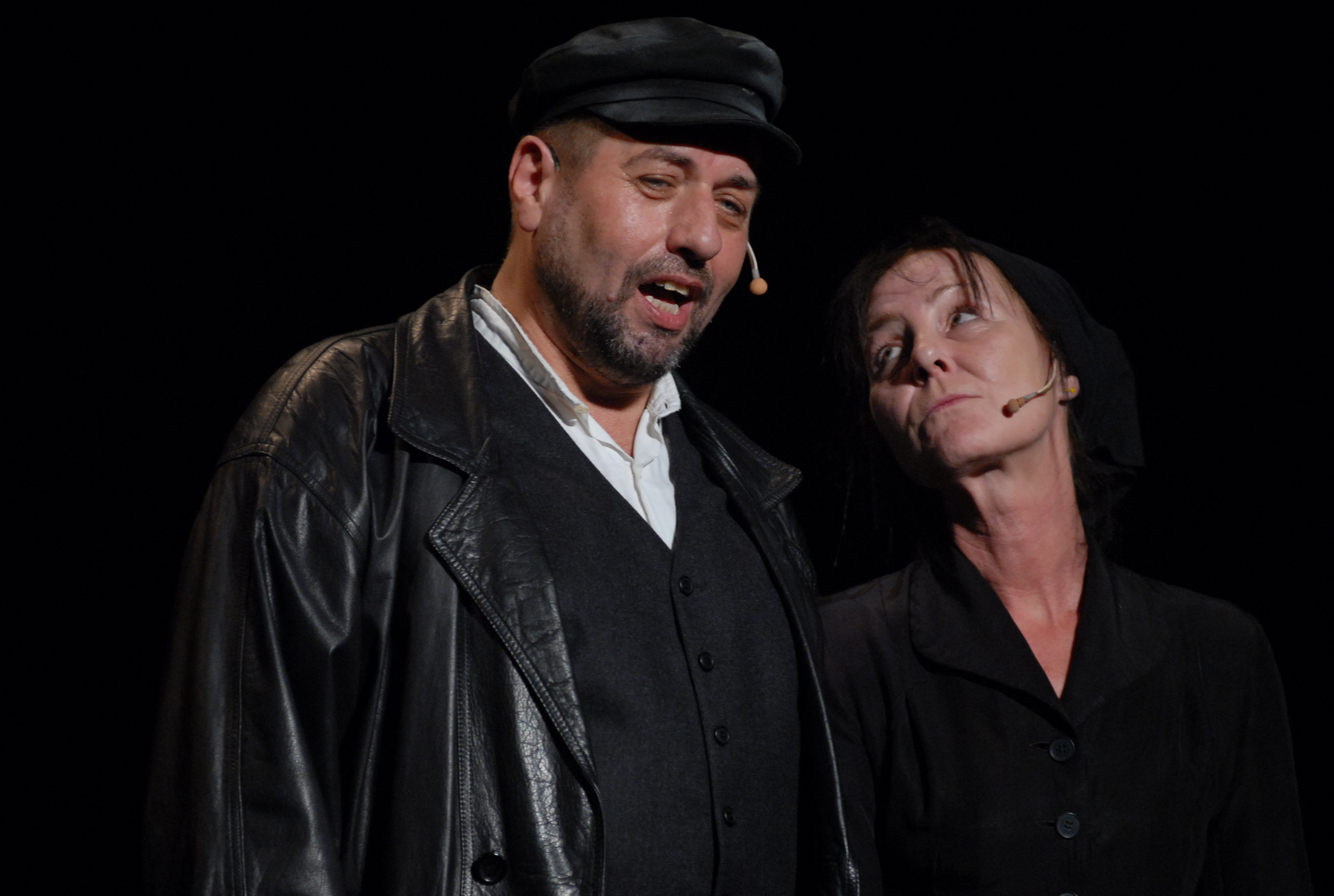 Fotka z muzikálu Šumař na střeše v provedení Městského divadla Brno (zleva: Zdeněk Junák a Miroslava Kolářová)Photo from the musical Fiddler on the Roof at the Brno City Theatre in the Czech Republic (from left: Zdeněk Junák and Miroslava Kolářová)